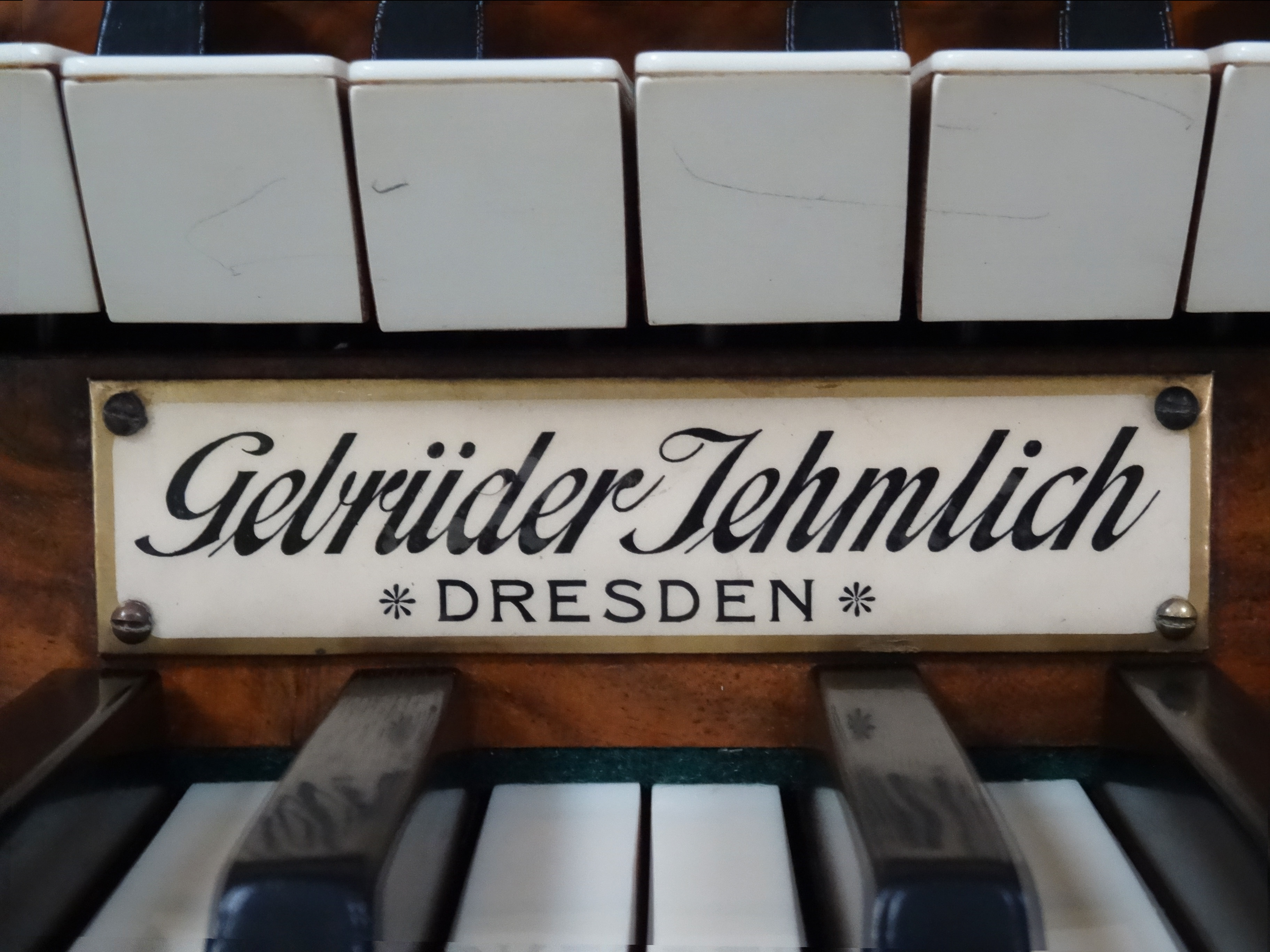 Firmenplakette an der Jehmlich-Orgel in der Winkelkirche St. Concordia (Ruhla)